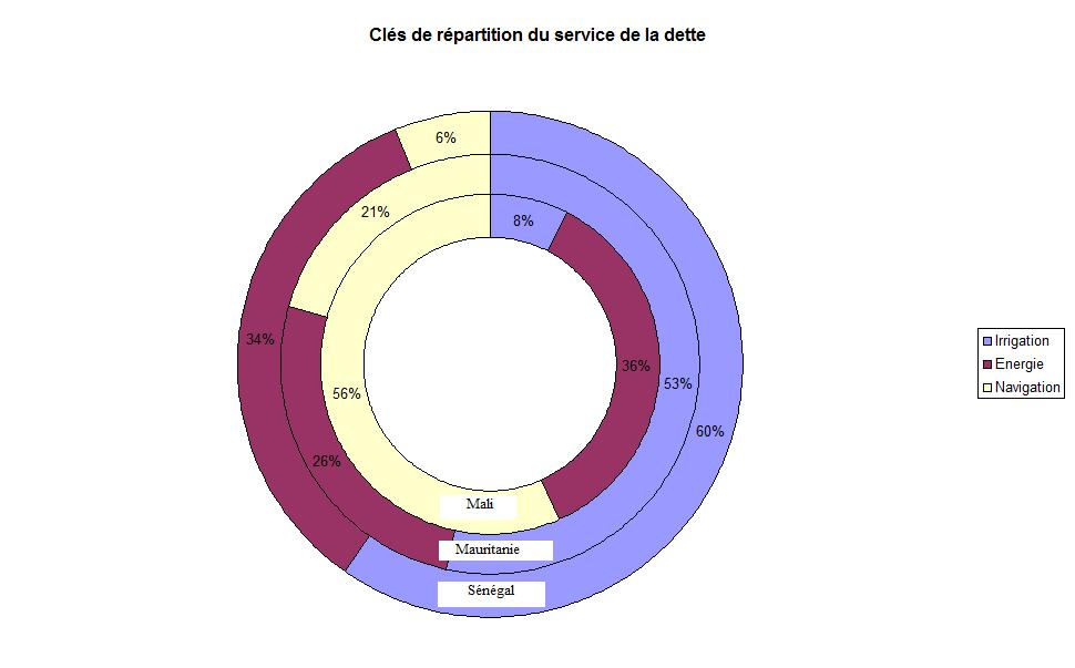 Clés de répartition du service de la dette de l'Organisation de mise en valeur du Sénégal (2009)